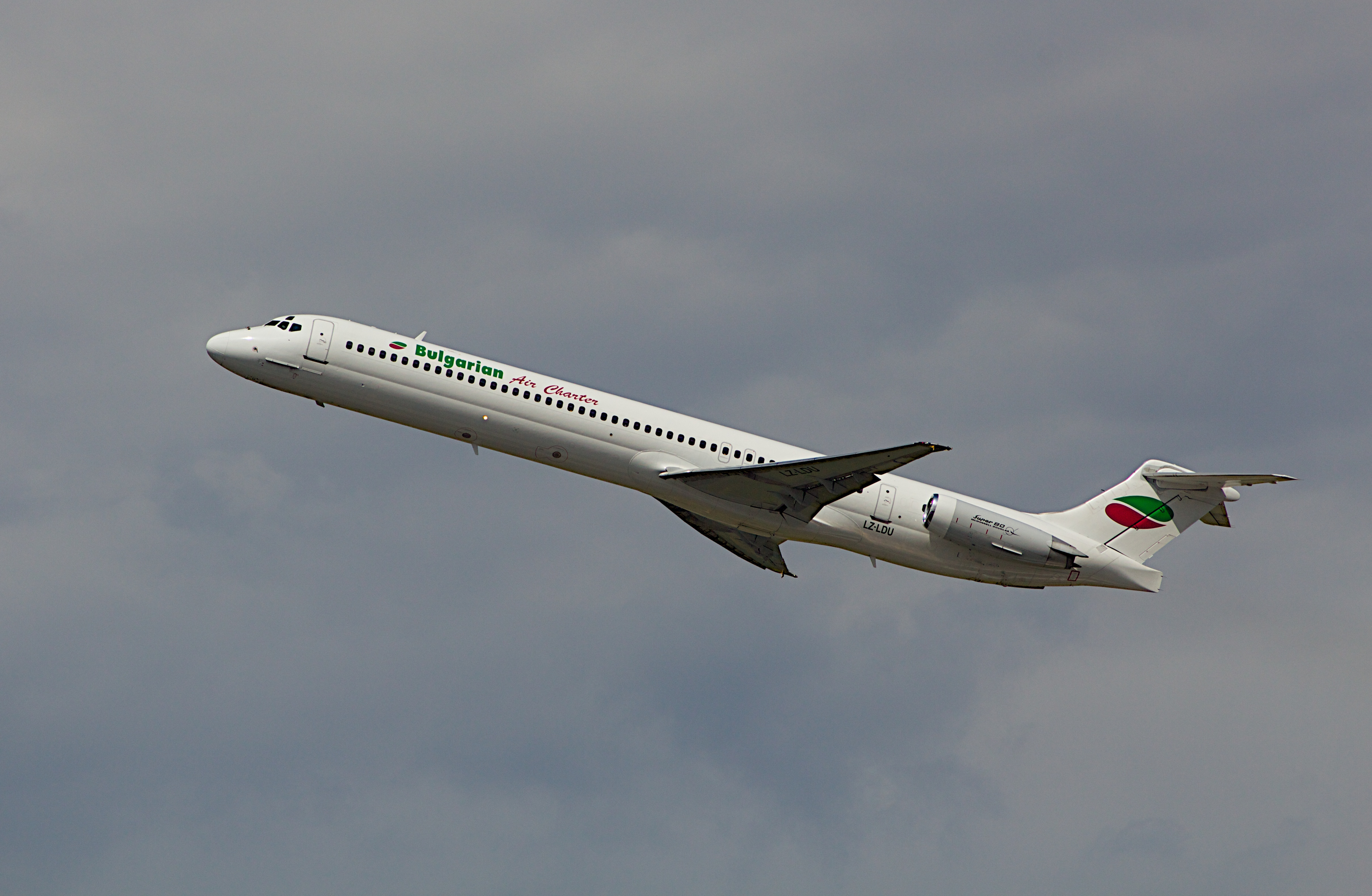 Dusseldorf Airport.